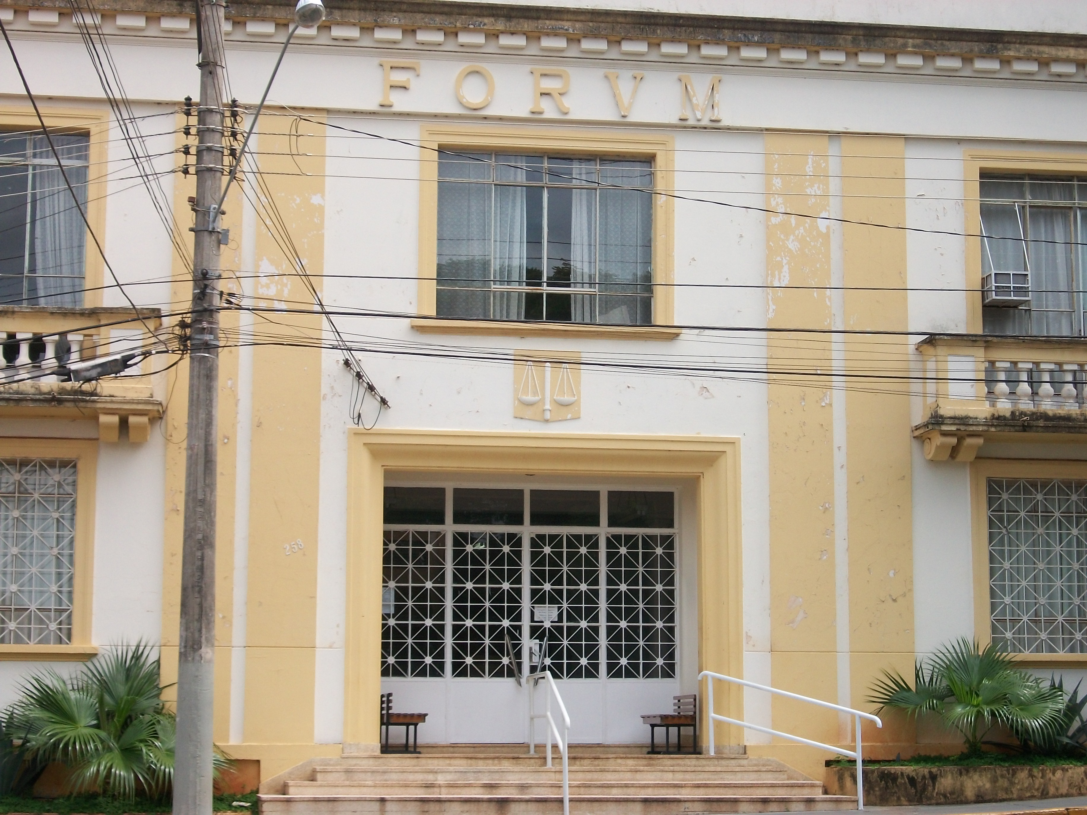 Amtsgericht von São Simão-SP; Februar von 2010.